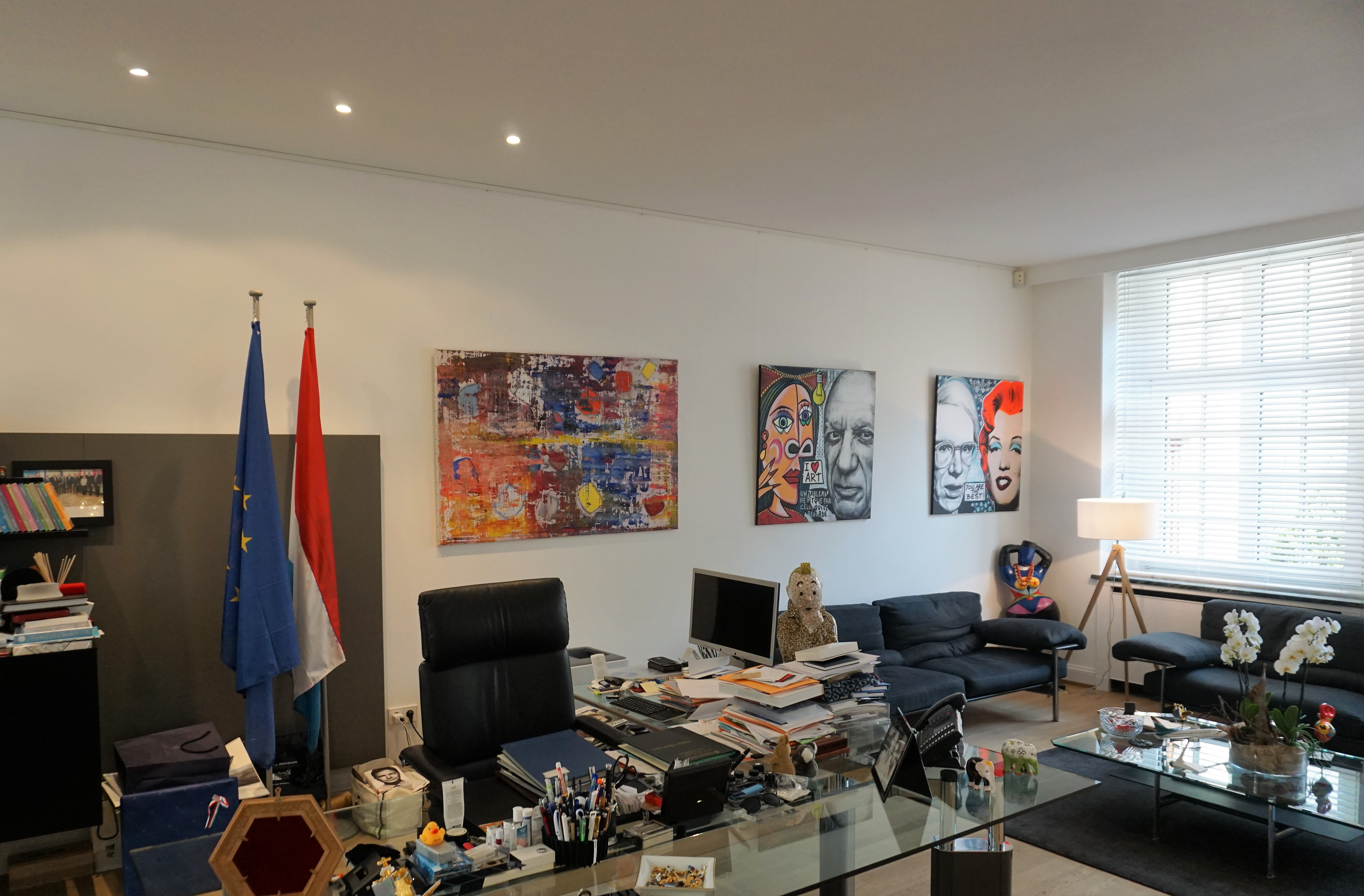 Luxembourg, intérieur de l'Hôtel de Bourgogne. Le bureau du Premier Ministre, Xavier Bettel.